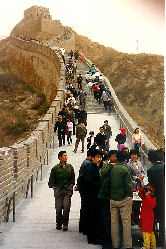 D'chineesesch Mauer, e Symbol vu Peking.